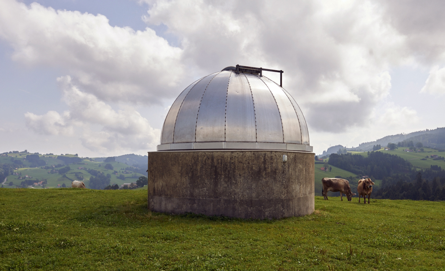 Sternwarte, Kantonsschule Trogen